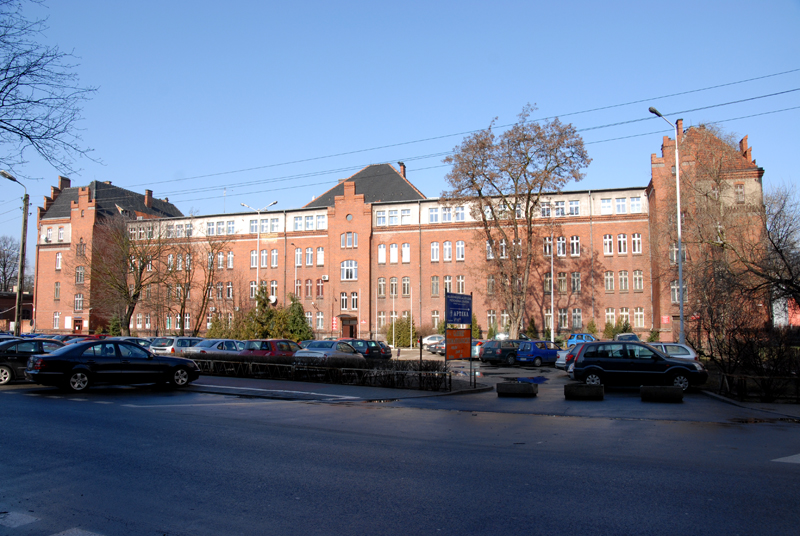 adres: 61-736 Poznań, ul. Solna 21